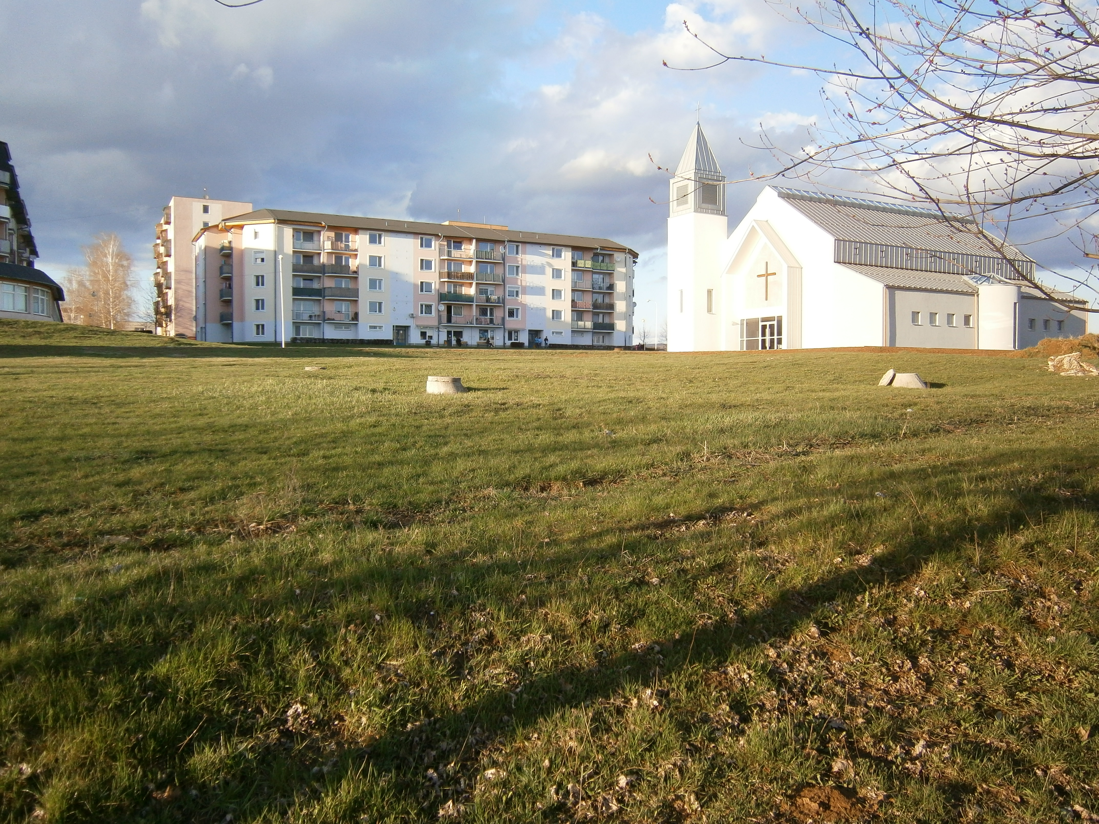 Kostol Najsvätejšieho Srdca Ježišovho